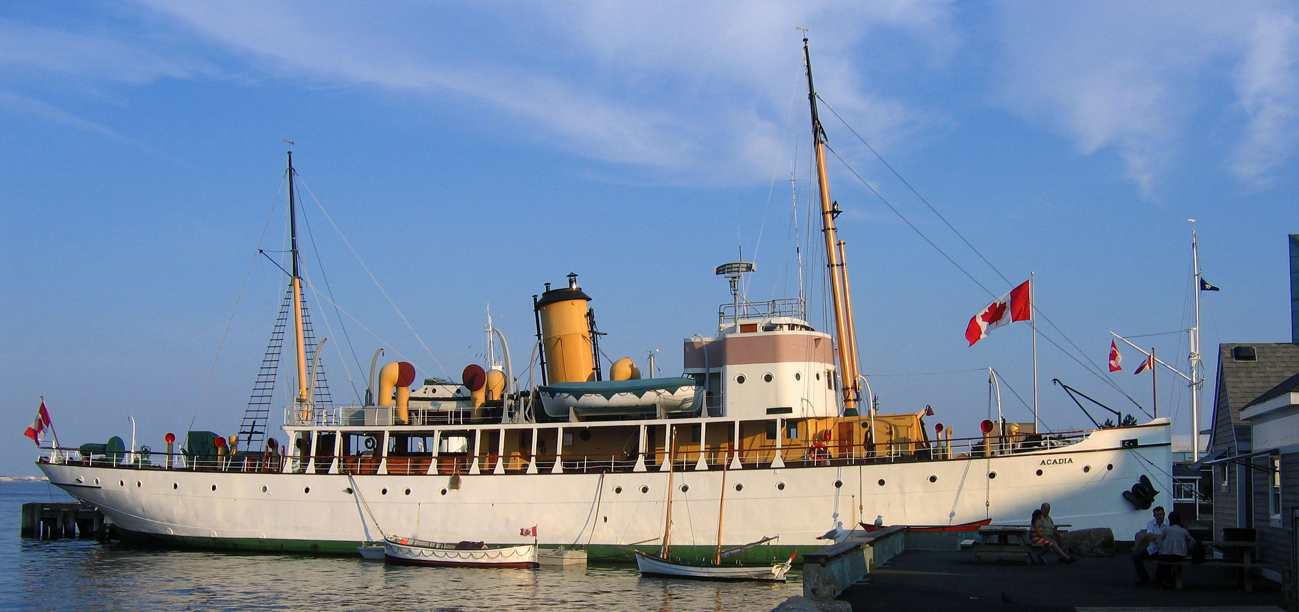 CSS Acadia, Halifax, Nova Scotia, Canada